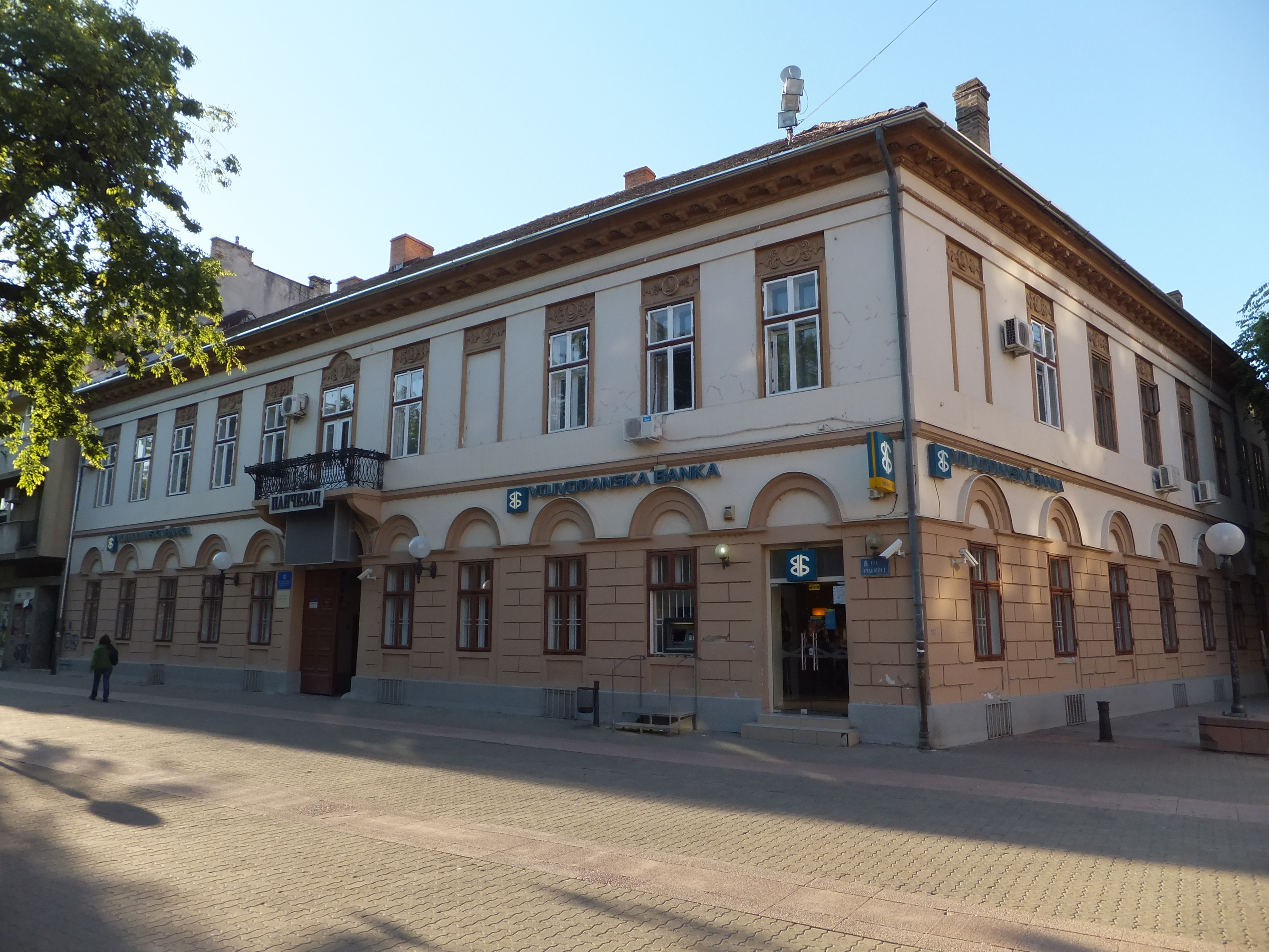 Зграда на Тргу краља Петра 11 у Панчеву